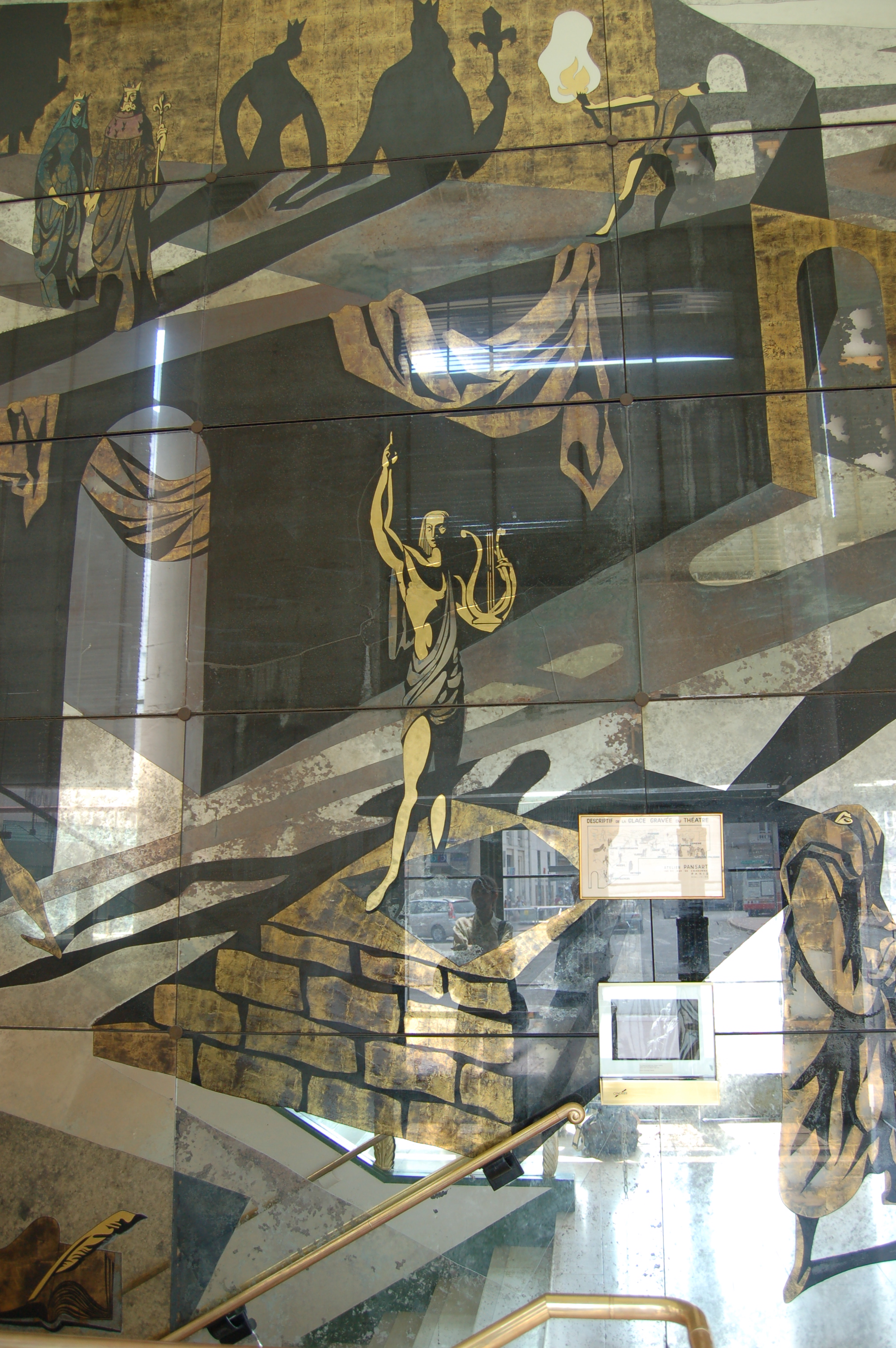 Miroir églomisé de l'ancien théâtre municipal de Poitiers, par Robert Pansart (1955)